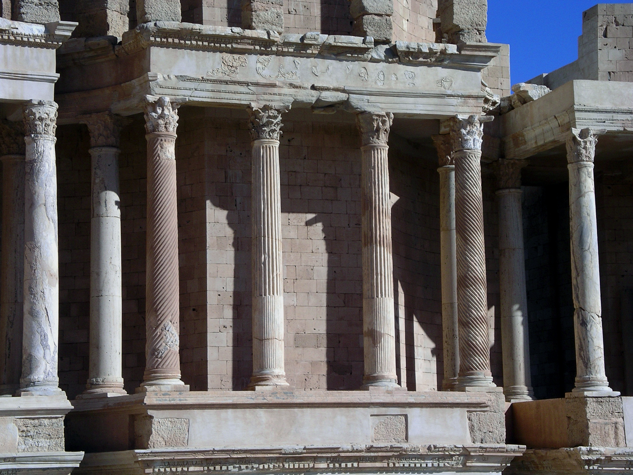 Römisches Theater - Detail des Bühnenhauses